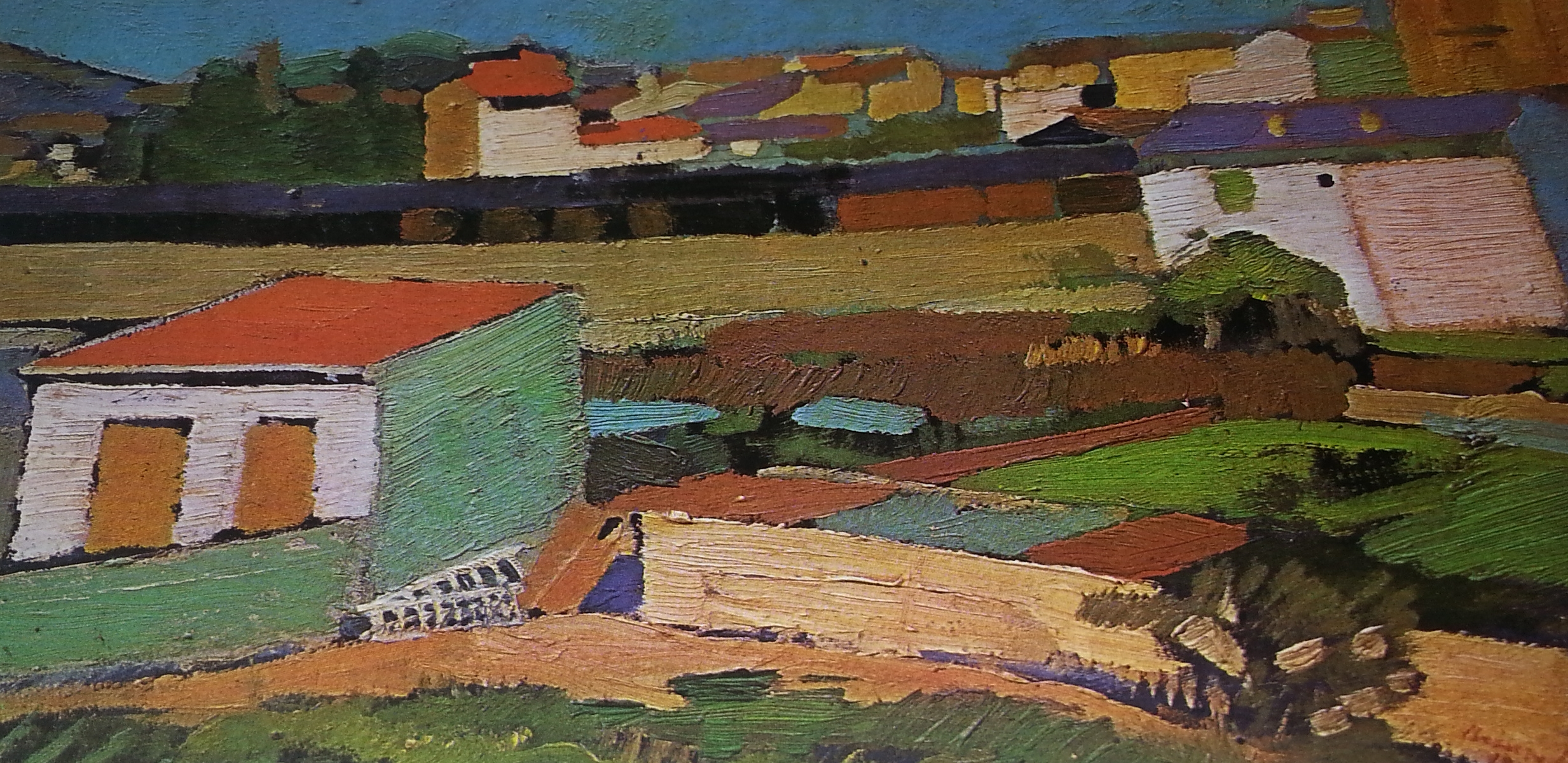 Opera di Arturo Checchi nel museo di Fucecchio